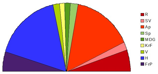 Valgresultat vist i halvsirklet sektordiagram for Bodø kommune, lokalvalget 2015.